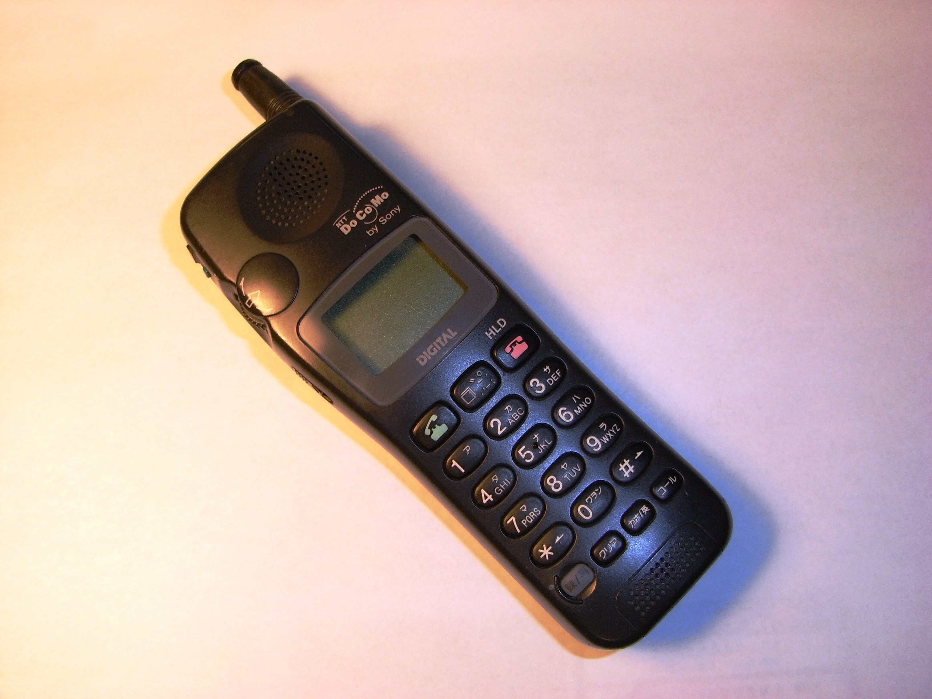 NTT DoCoMo SO101